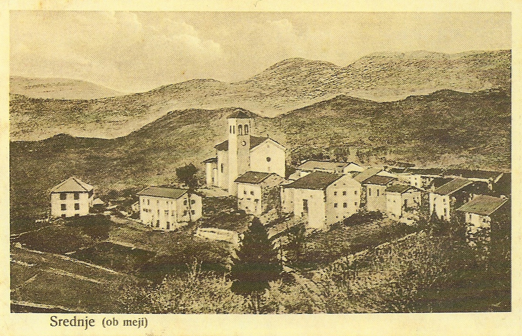 Razglednica Sredenj.